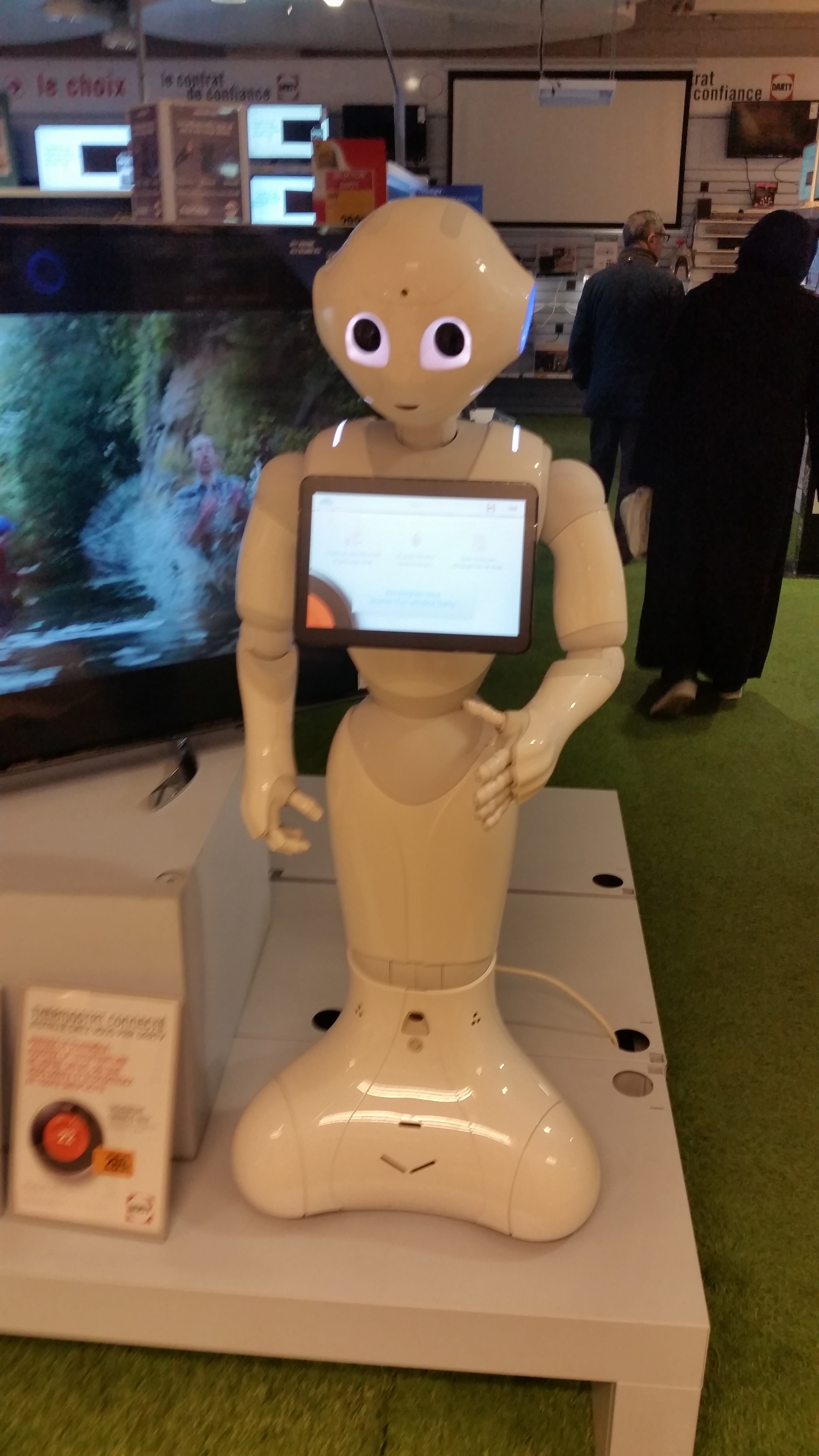 Robot Pepper au Darty des Quatres Temps à la Défense